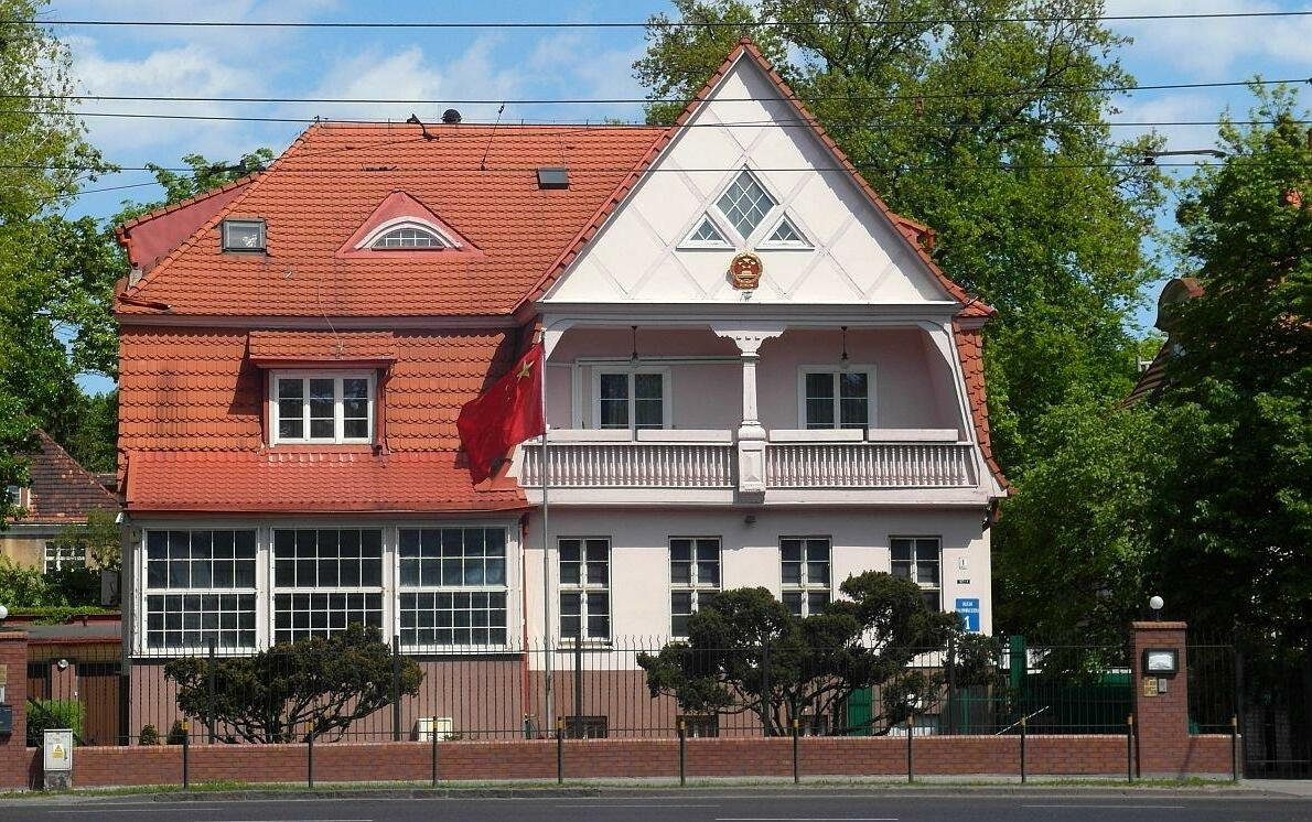 Konsulat ChRL w Gdańsku czyli budynek z nr 1, na Alei Grunwaldzkiej.